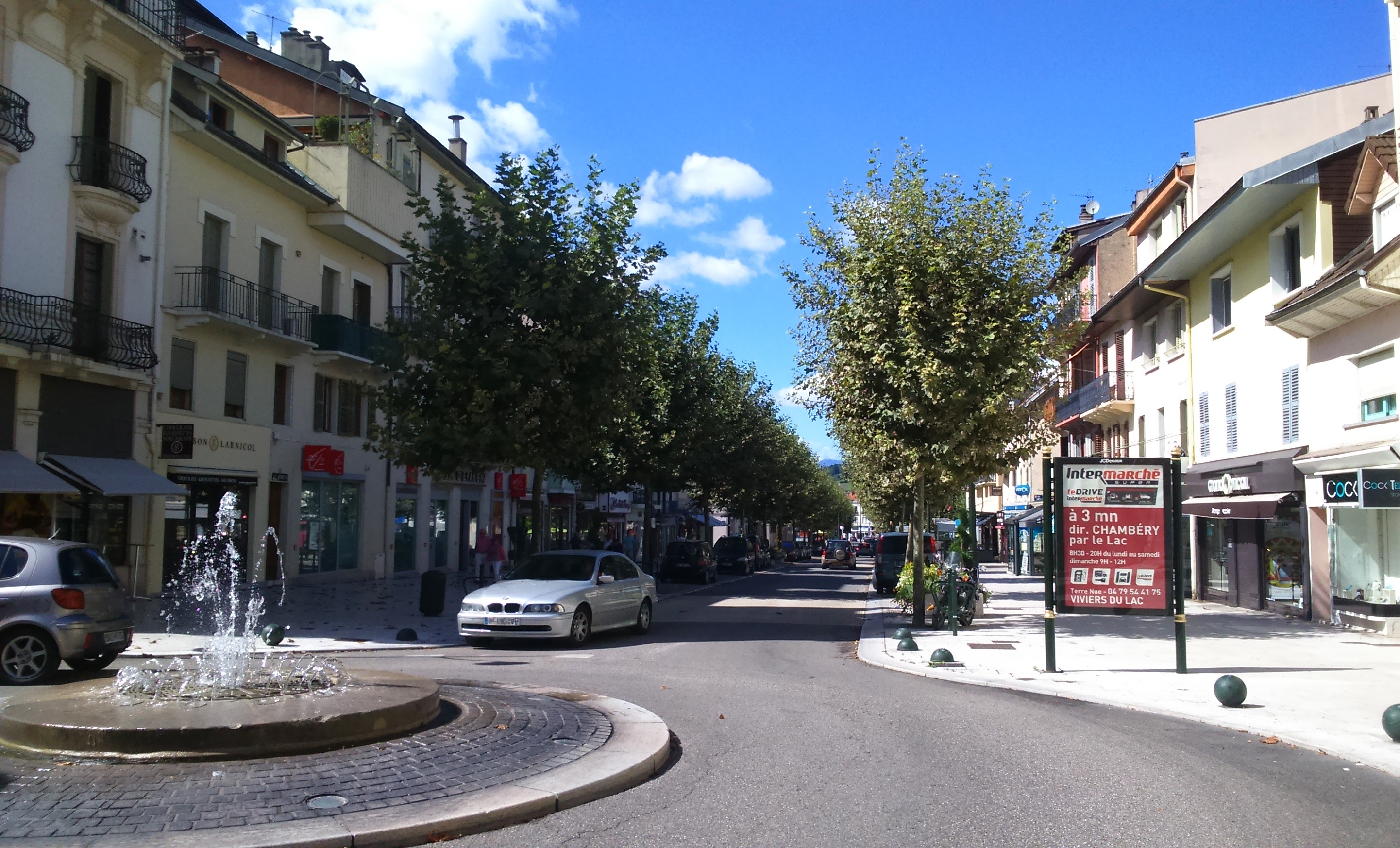 La rue de Genève d'Aix-les-Bains en direction du lac au carrefour giratoire avec l'avenue du Grand Port.